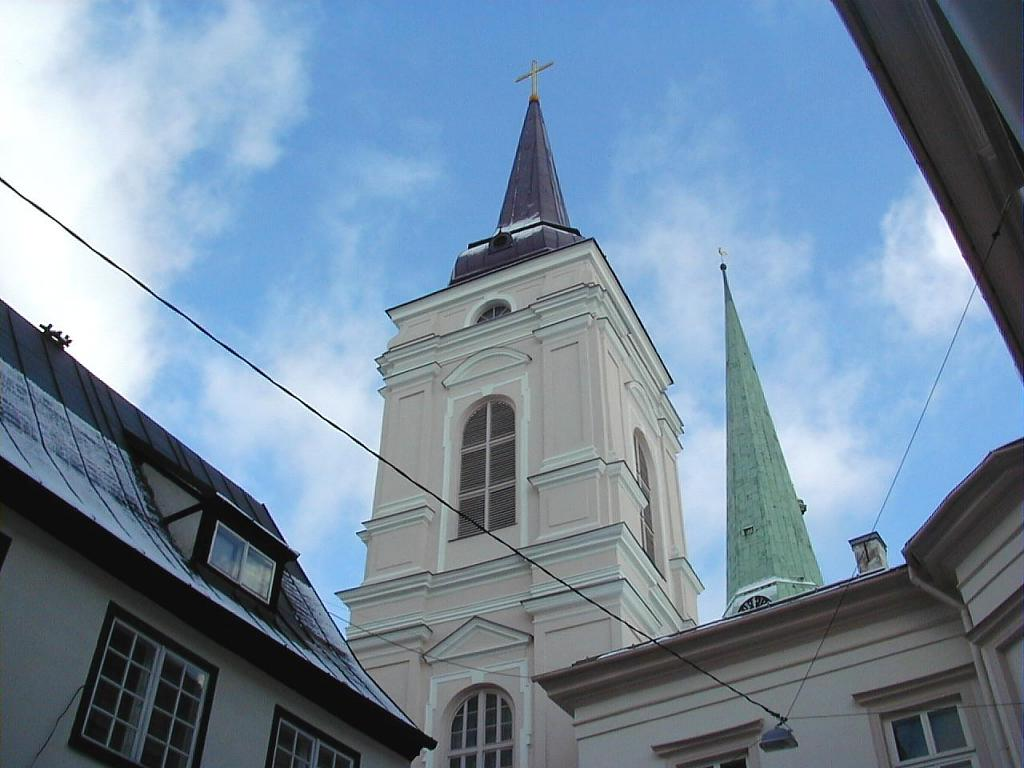 Rīga, Marijas Magdalēnas baznīcas tornis 2002-11-12